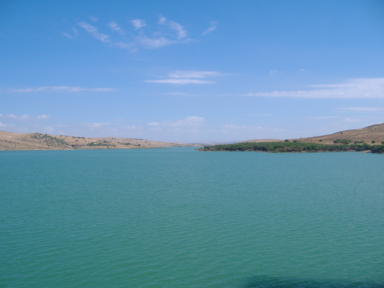 Vue du reservoir du Barrage de Sidi Salem